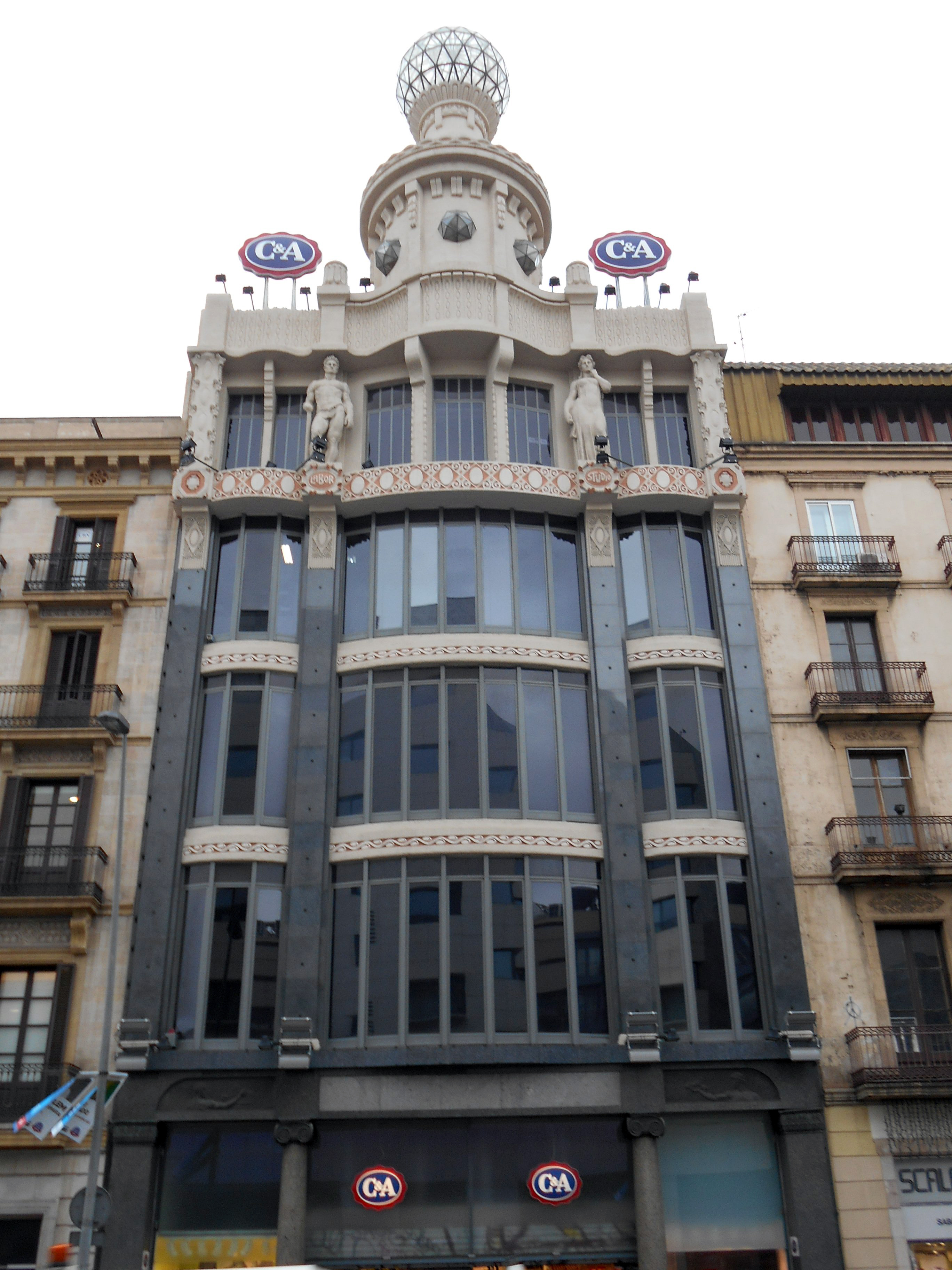 Casa Damians, posteriormente Almacenes El Siglo.